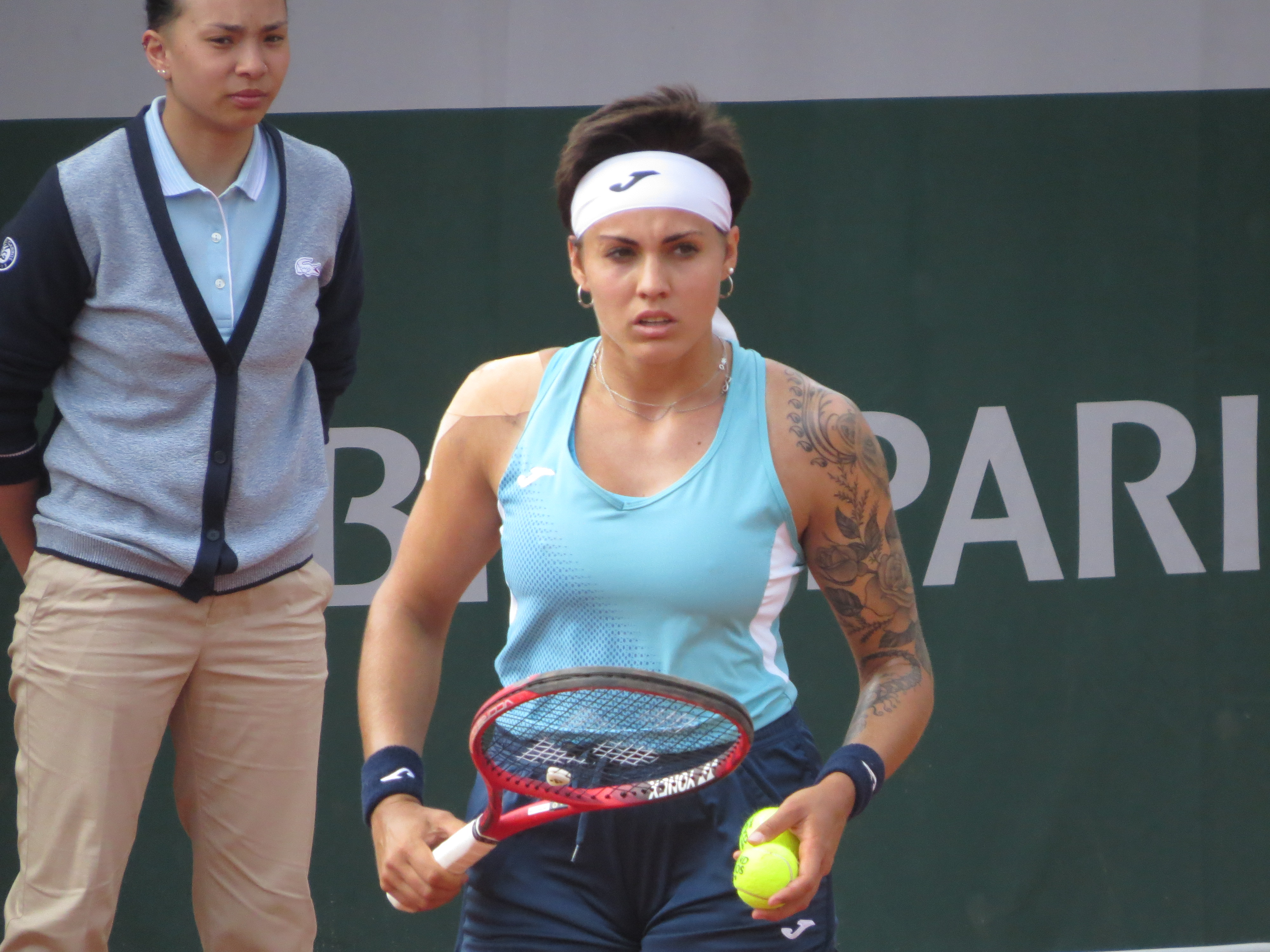 Aliona Bolsova lors de son premier tour des qualifications.